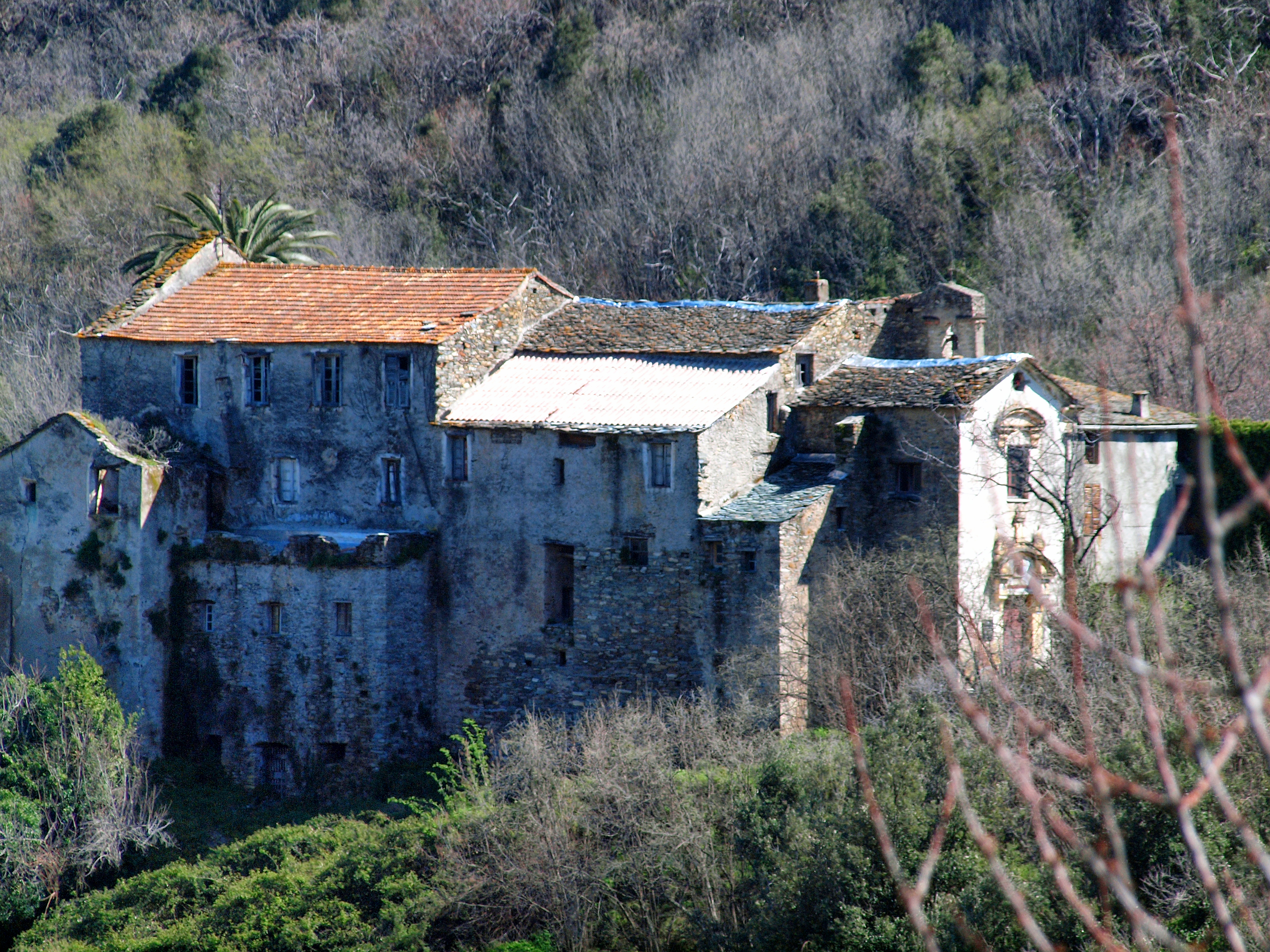 Vescovato, Casinca (Corse) - Ancien couvent des Capucins Notre-Dame des Grâces